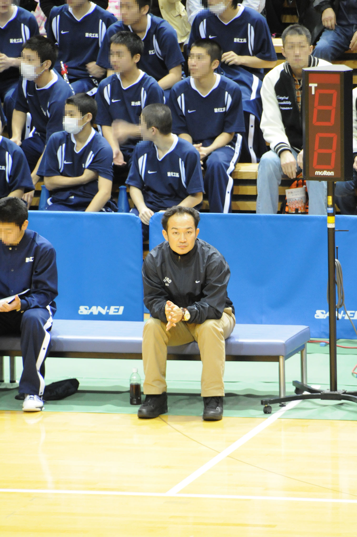 能代工業高校、佐藤信長監督。大館樹海体育館で。